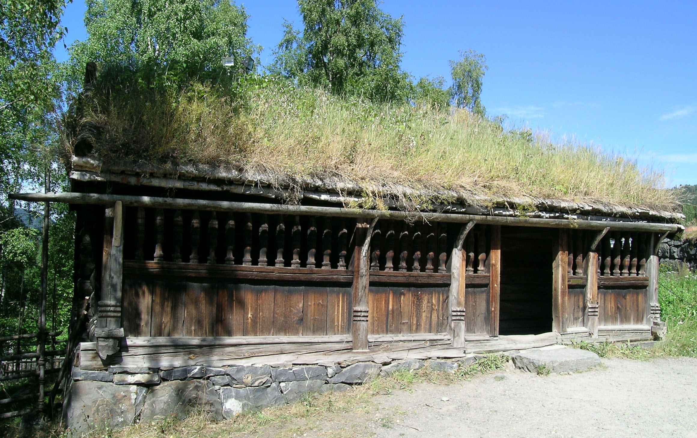 Årestue (open-hearth room) from Tolstadskriden, Vågå, Oppland. Built in the 1770s. Maihaugen folk museum, Lillehammer.